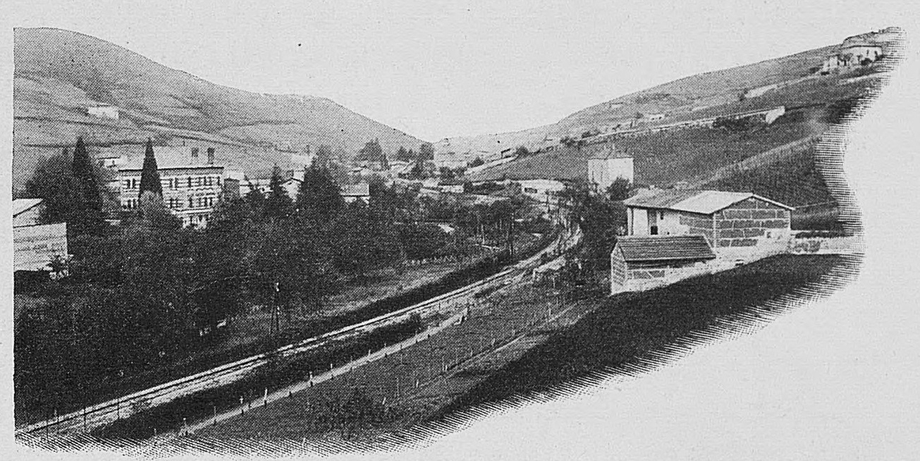 Dictionnaire illustré des communes du département du Rhône. Tome 1 / par MM. E. de Rolland et D. Clouzet.